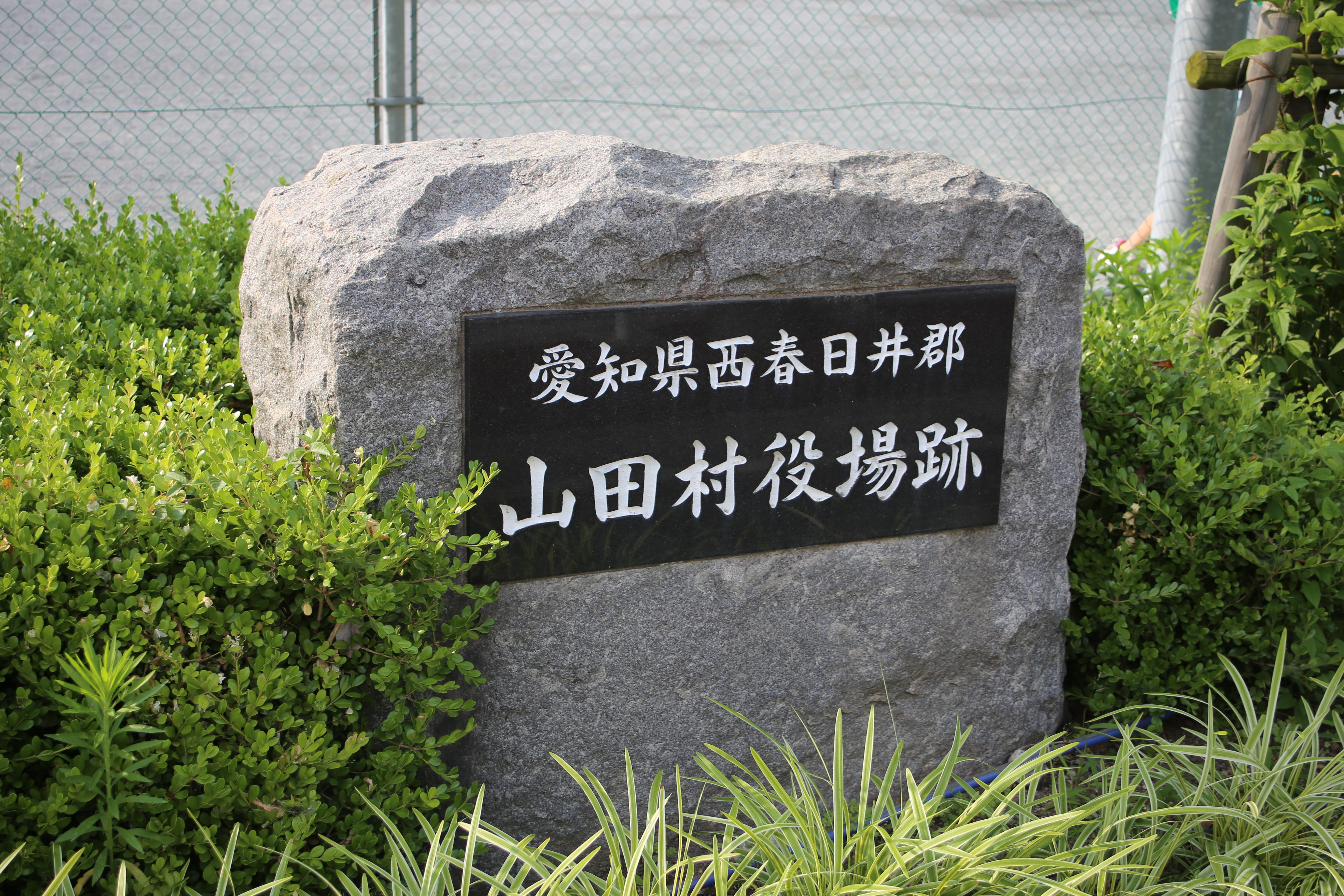 名古屋市西区八筋町の愛知県西春日井郡山田村役場跡地碑を南側公道西側より撮影